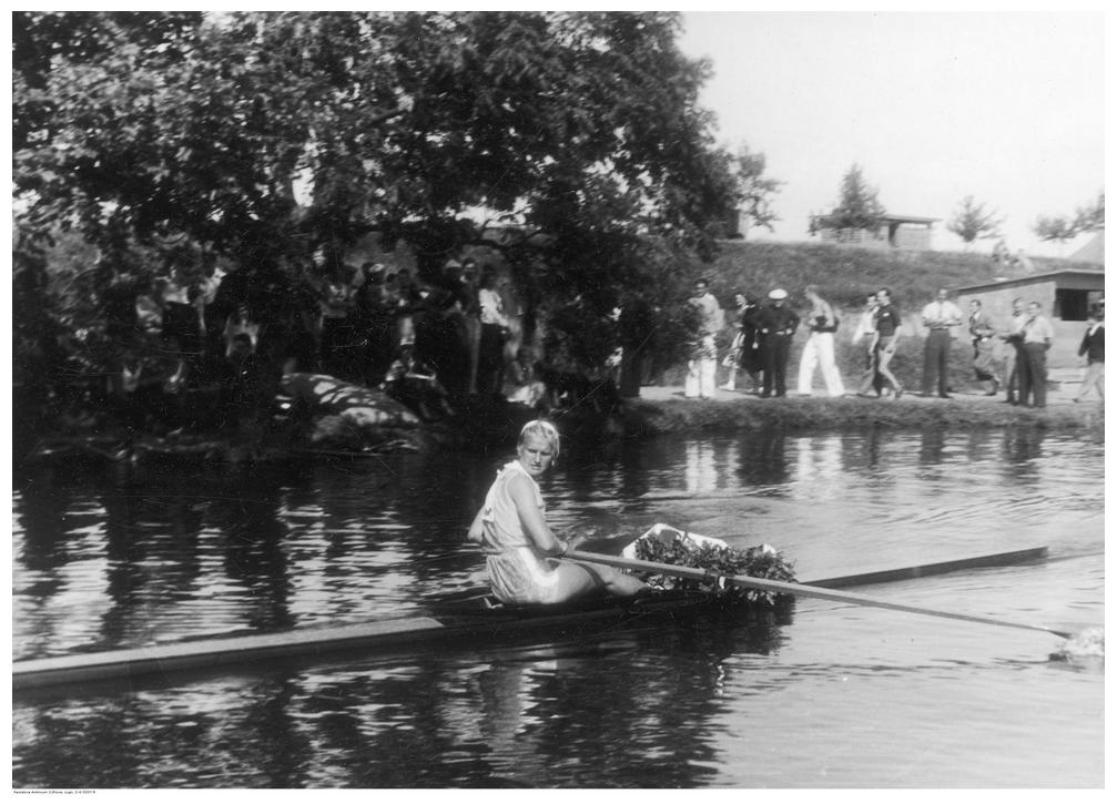 Maria Kepel (AZS Wilno) - mistrzyni Polski na jedynce 13-08-1939. Tor wioślarski w Witobelu pod Poznaniem.